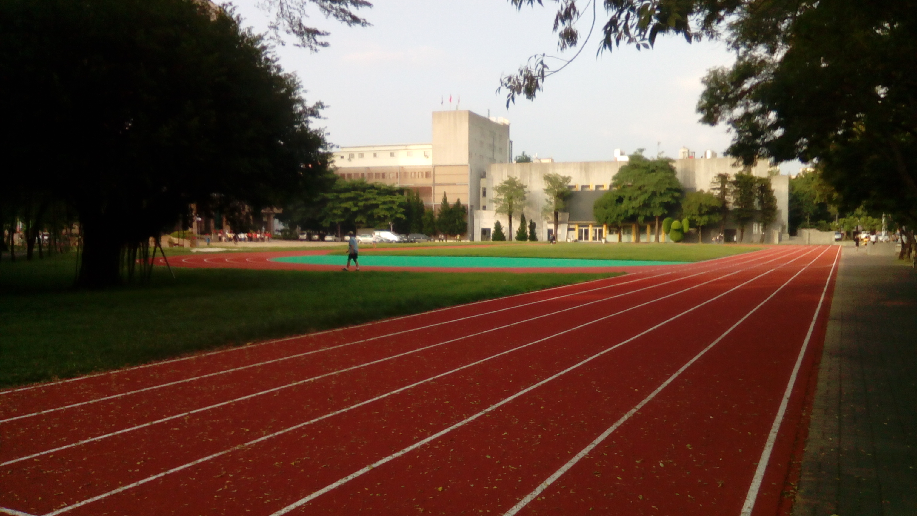 位於圖書館前 近正南五街